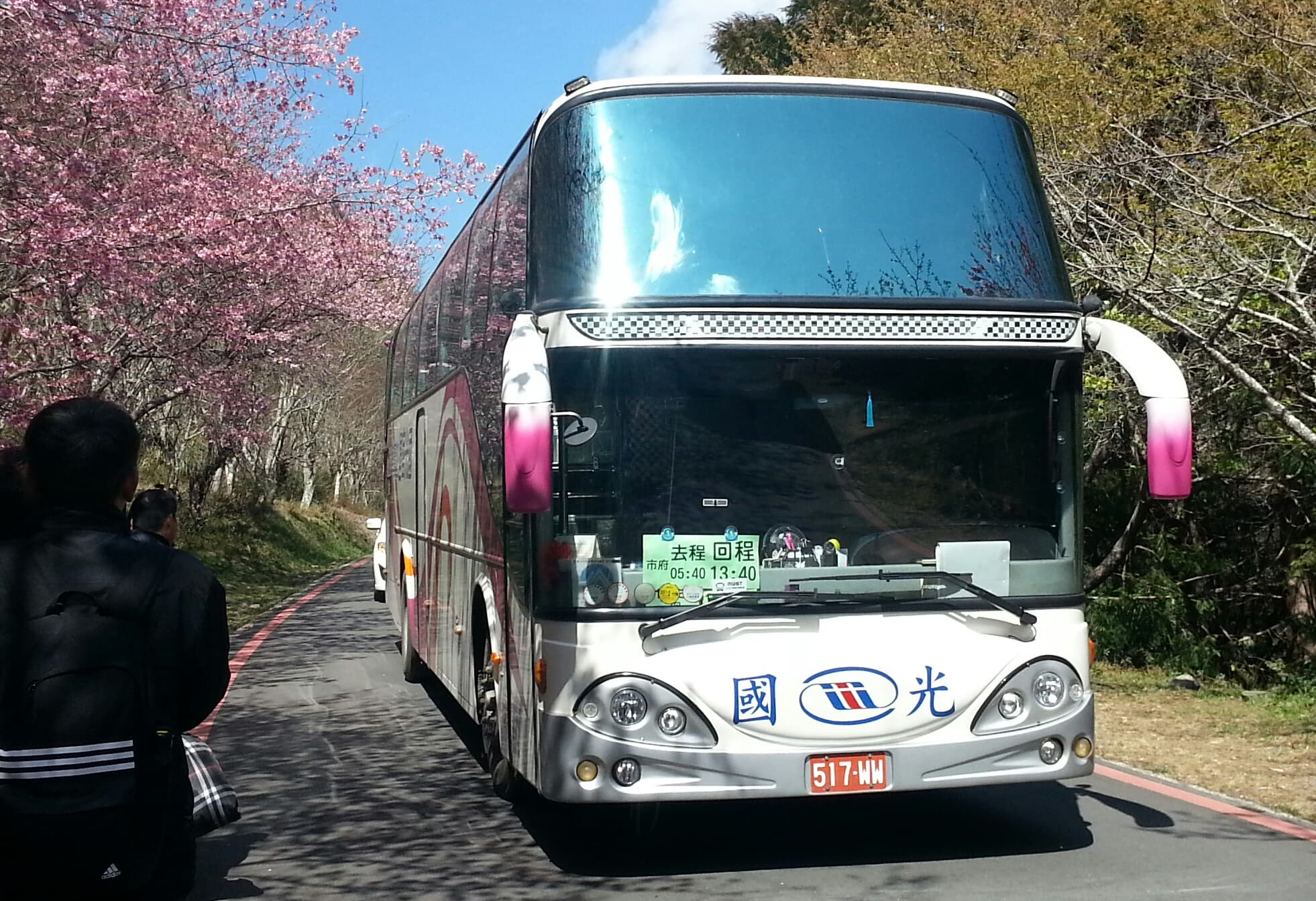 中文（台灣）: 國光客運2013年大宇FX117遊覽車517-WW。